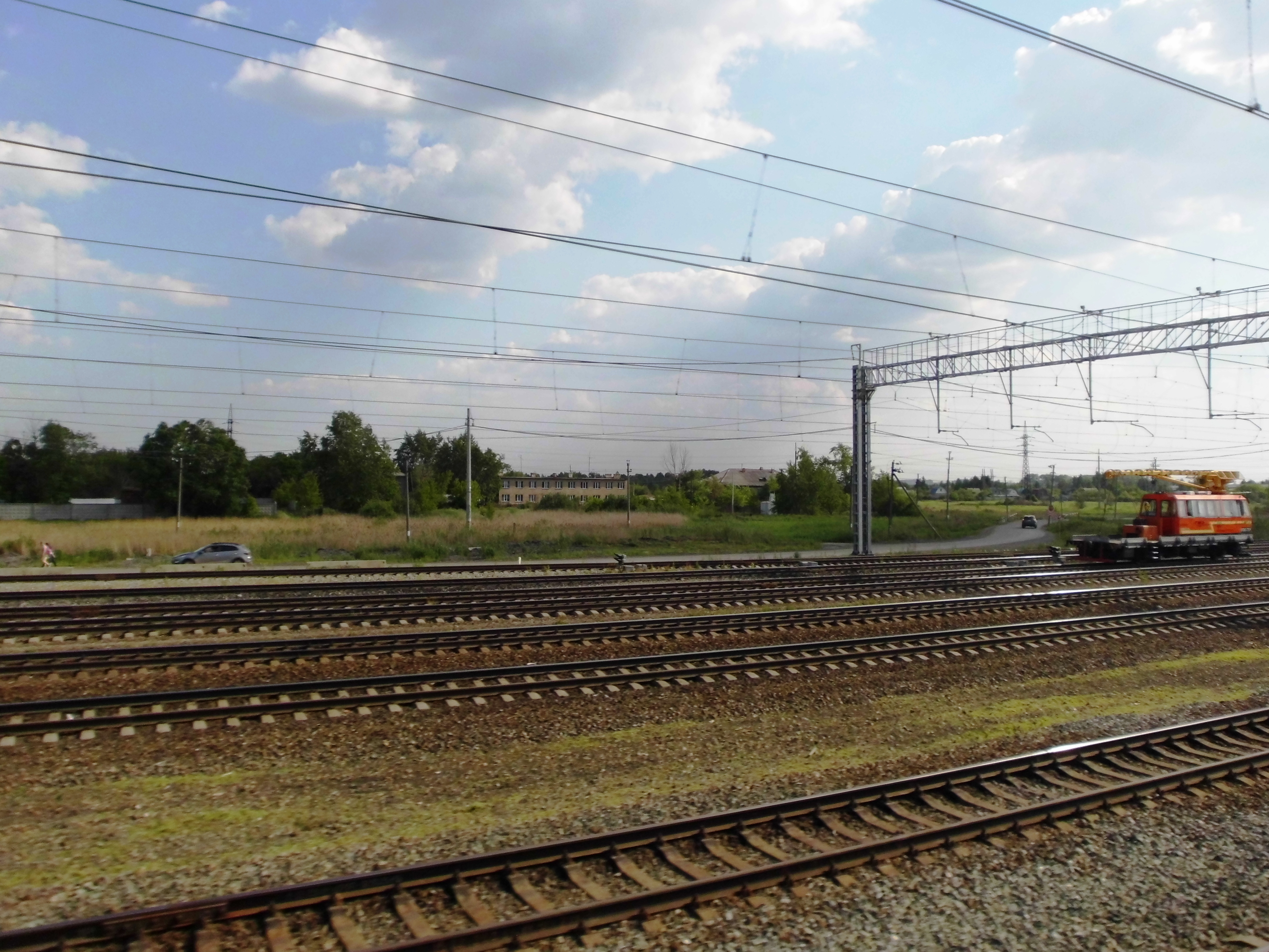 Россия, г.Челябинск, парк путей железнодорожной станции "Чурилово" ЮУЖД